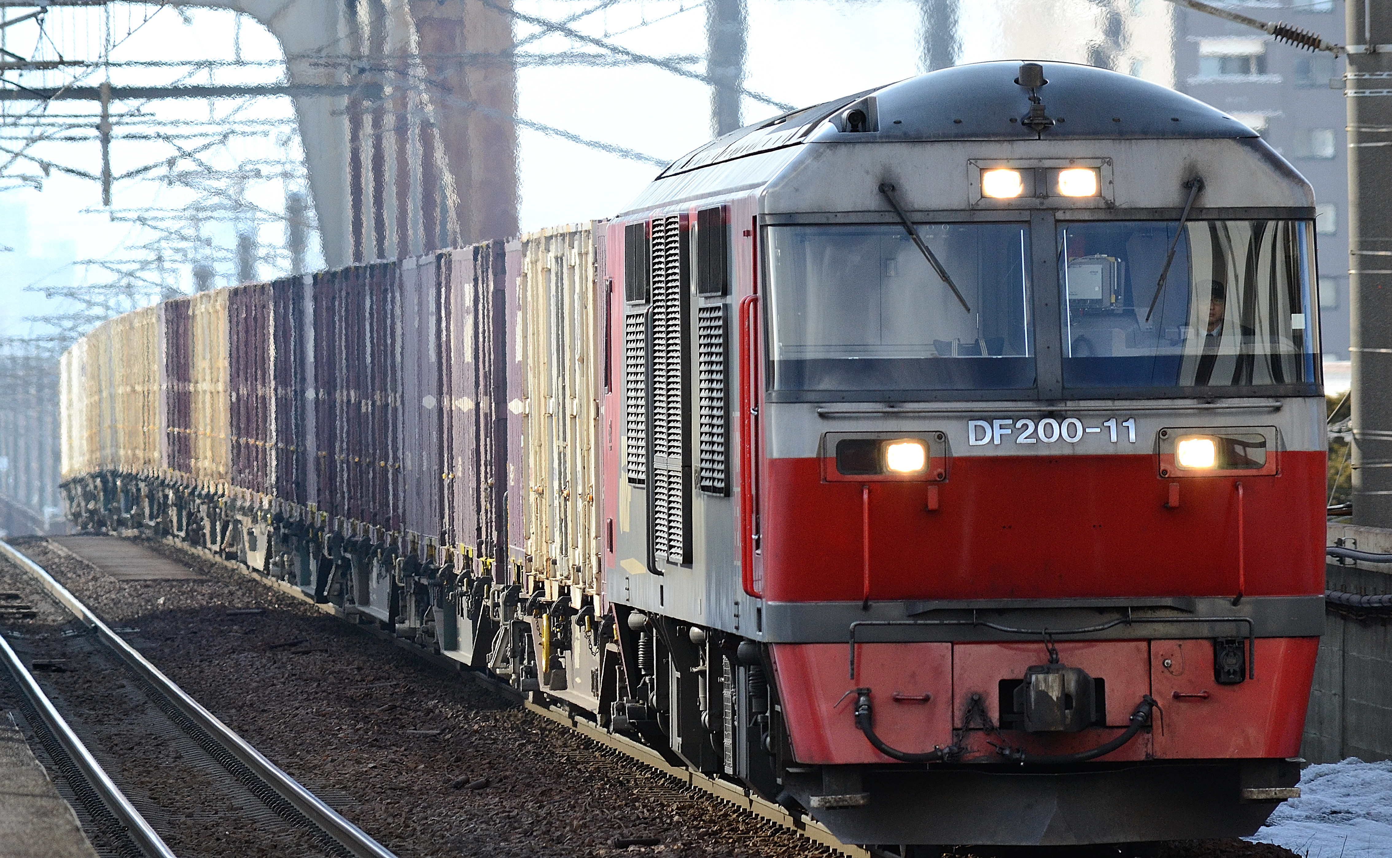 千歳線を走行する、DF200形ディーゼル機関車が牽引する貨物列車 （新札幌駅ホームから撮影）